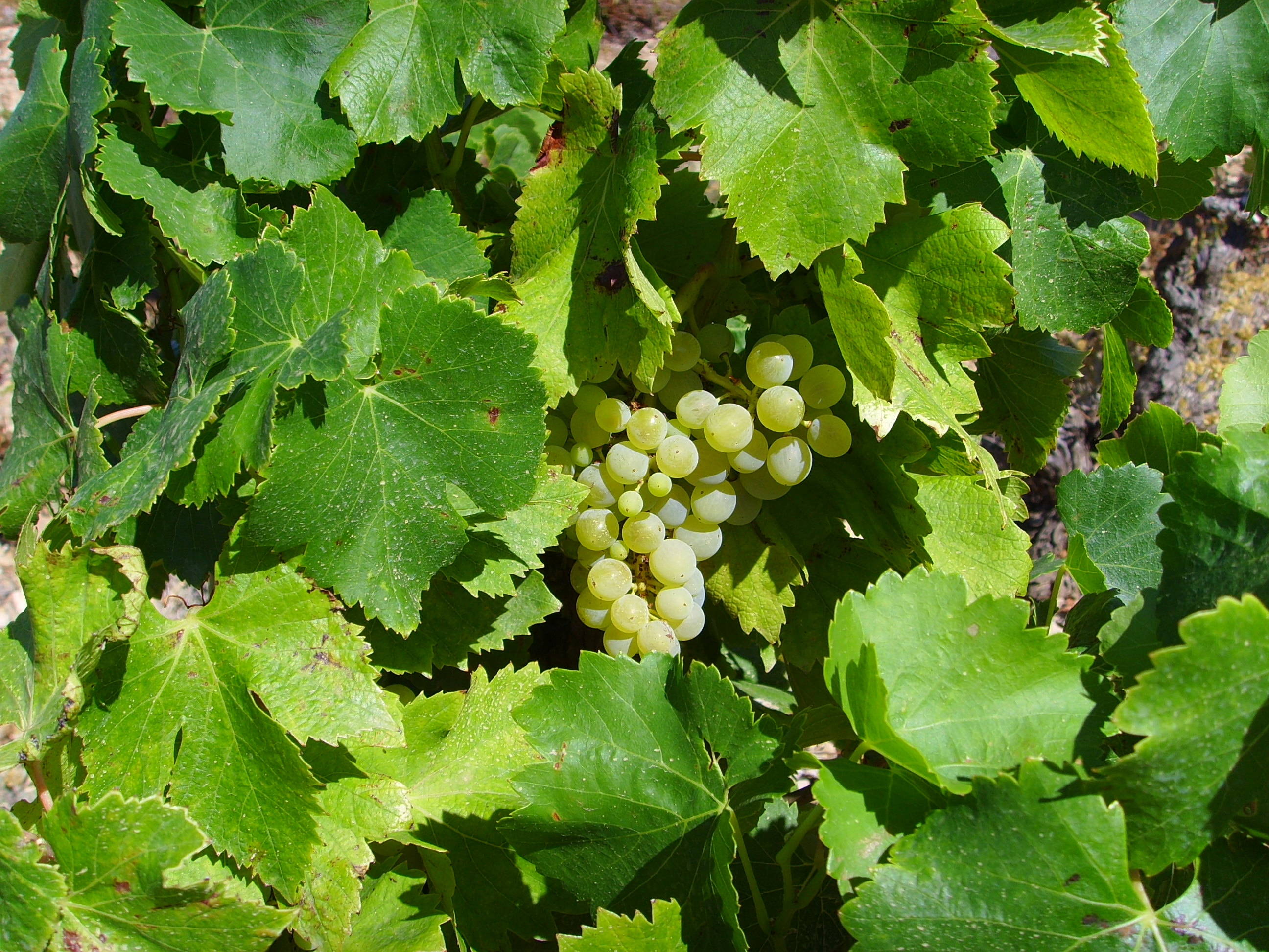 Vigne AOC Cru Fitou summer 2006, Cap Leucate author: Gerbil